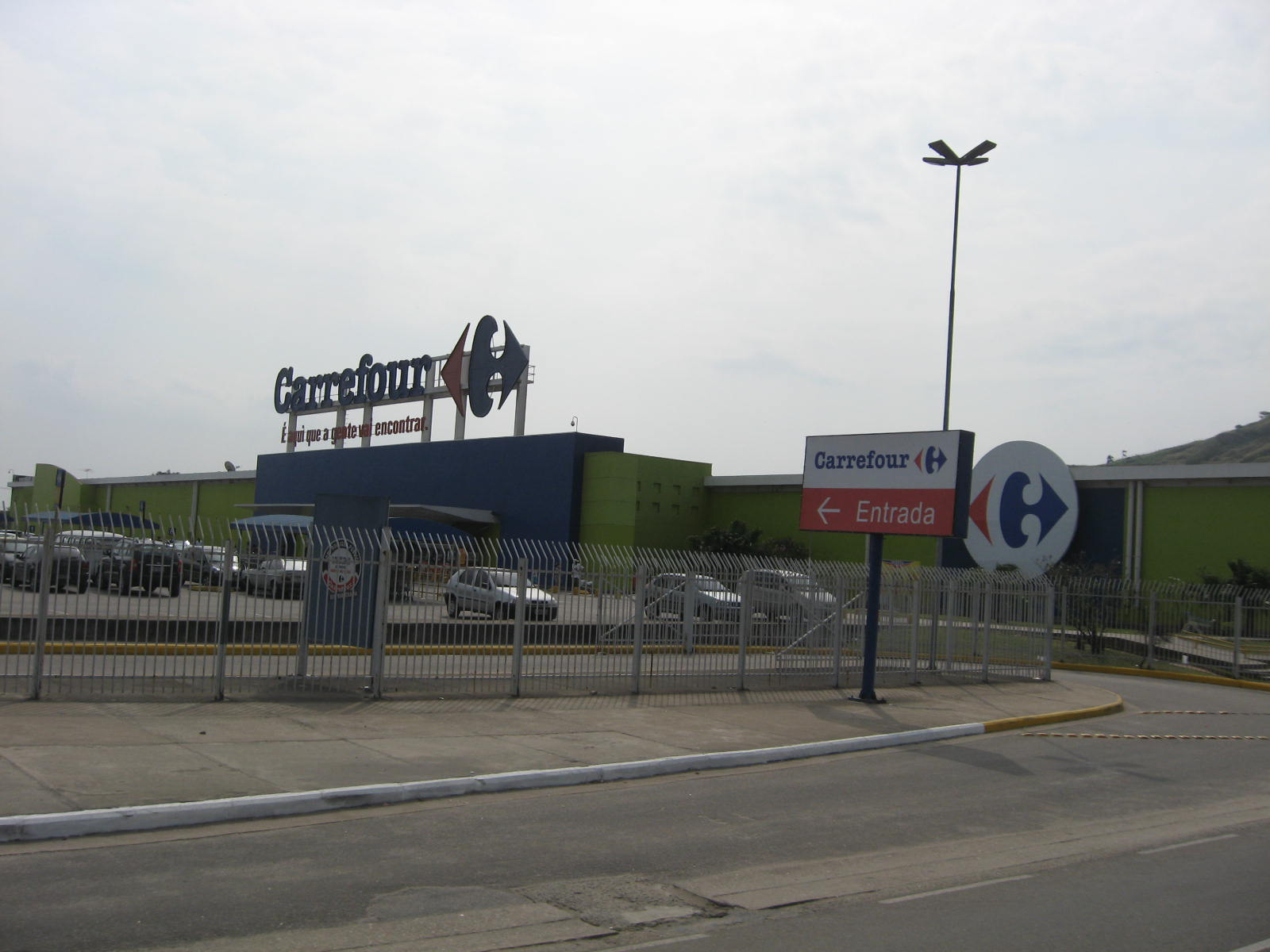 Supermercado Carrefour, em Niterói, estado do Rio de Janeiro, Brasil.